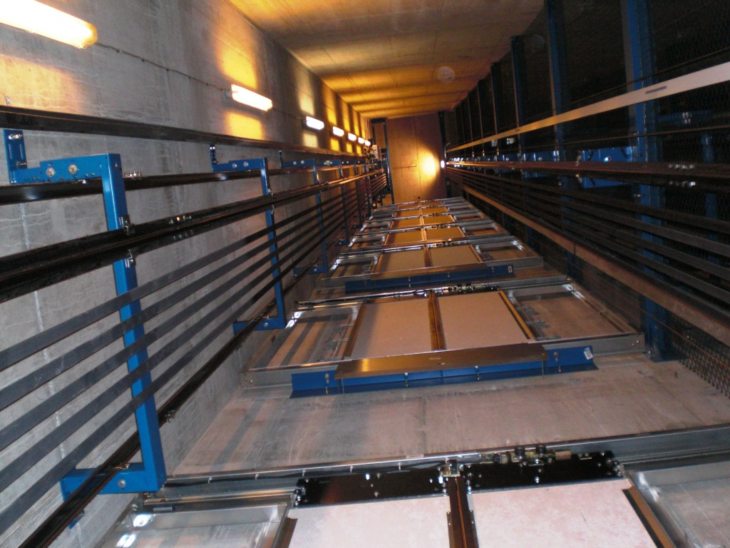 Schacht eines Aufzugs mit Schachttüren von innen